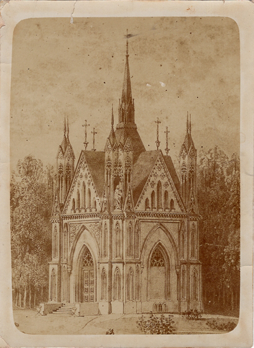 Беларуская (тарашкевіца): Закозель (Zakoziel). Капліца